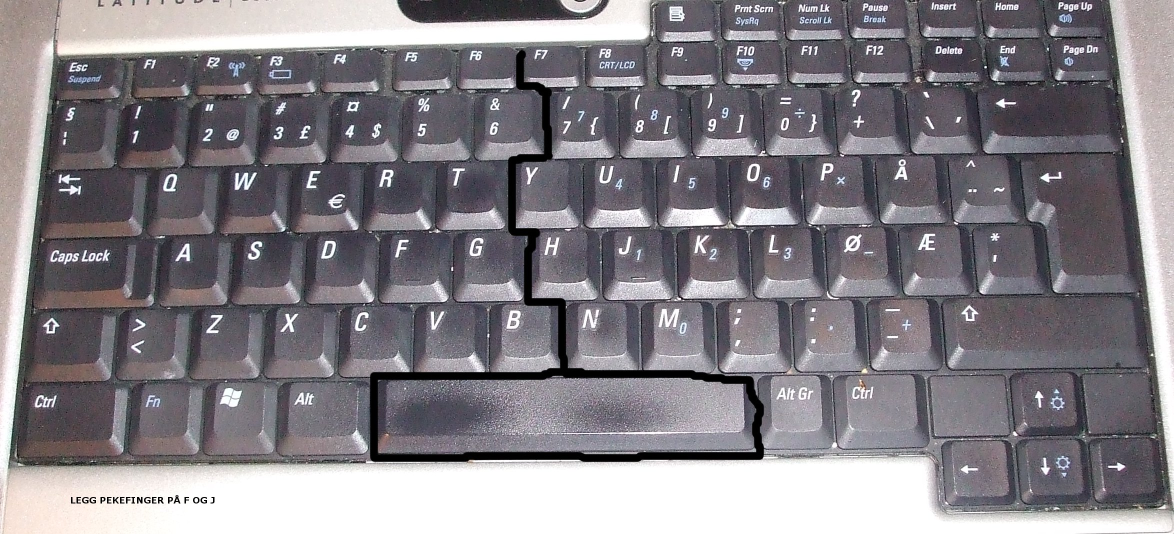 keyboard